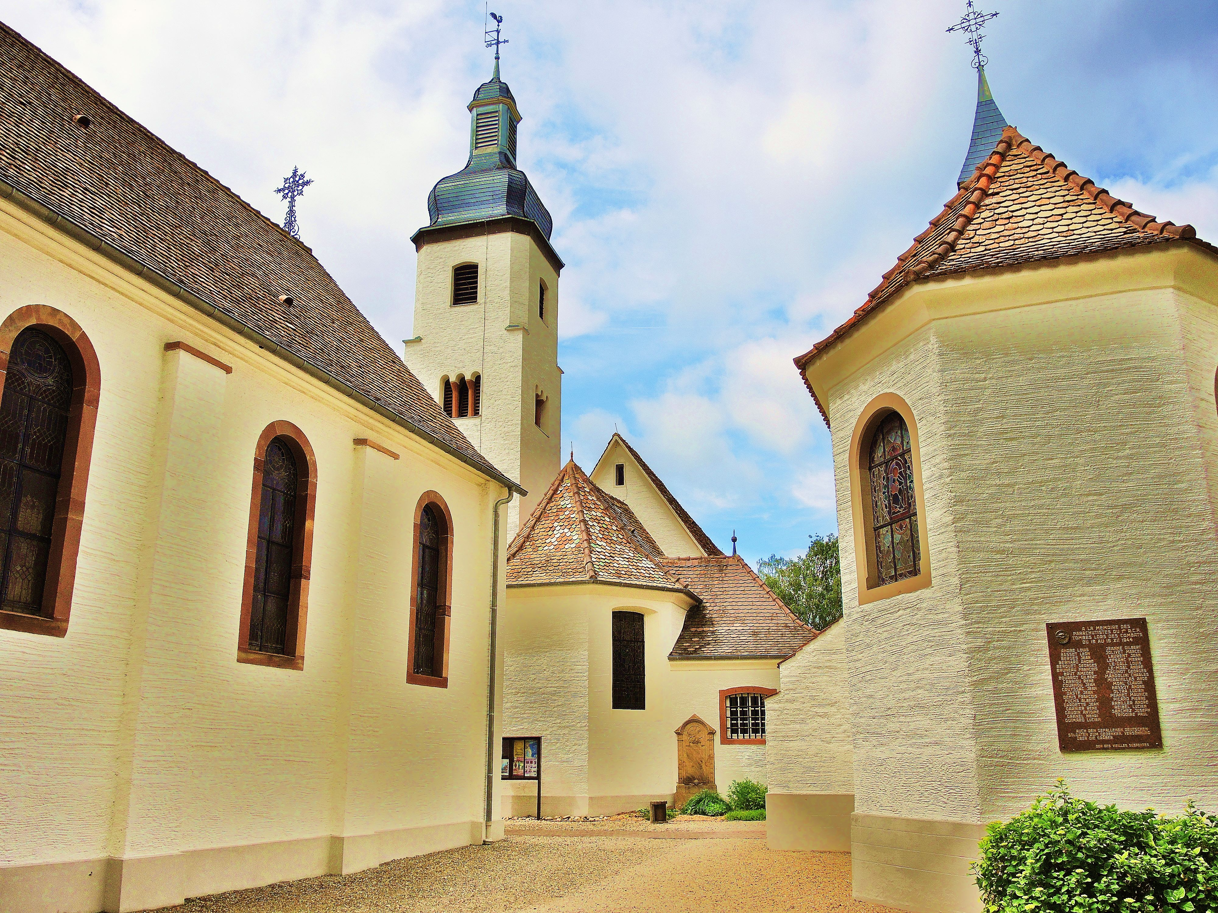 Eglise Notre-Dame de Neunkirch.